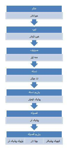 تۆرکجه: پیشیک کیمیلر بولونمه لری